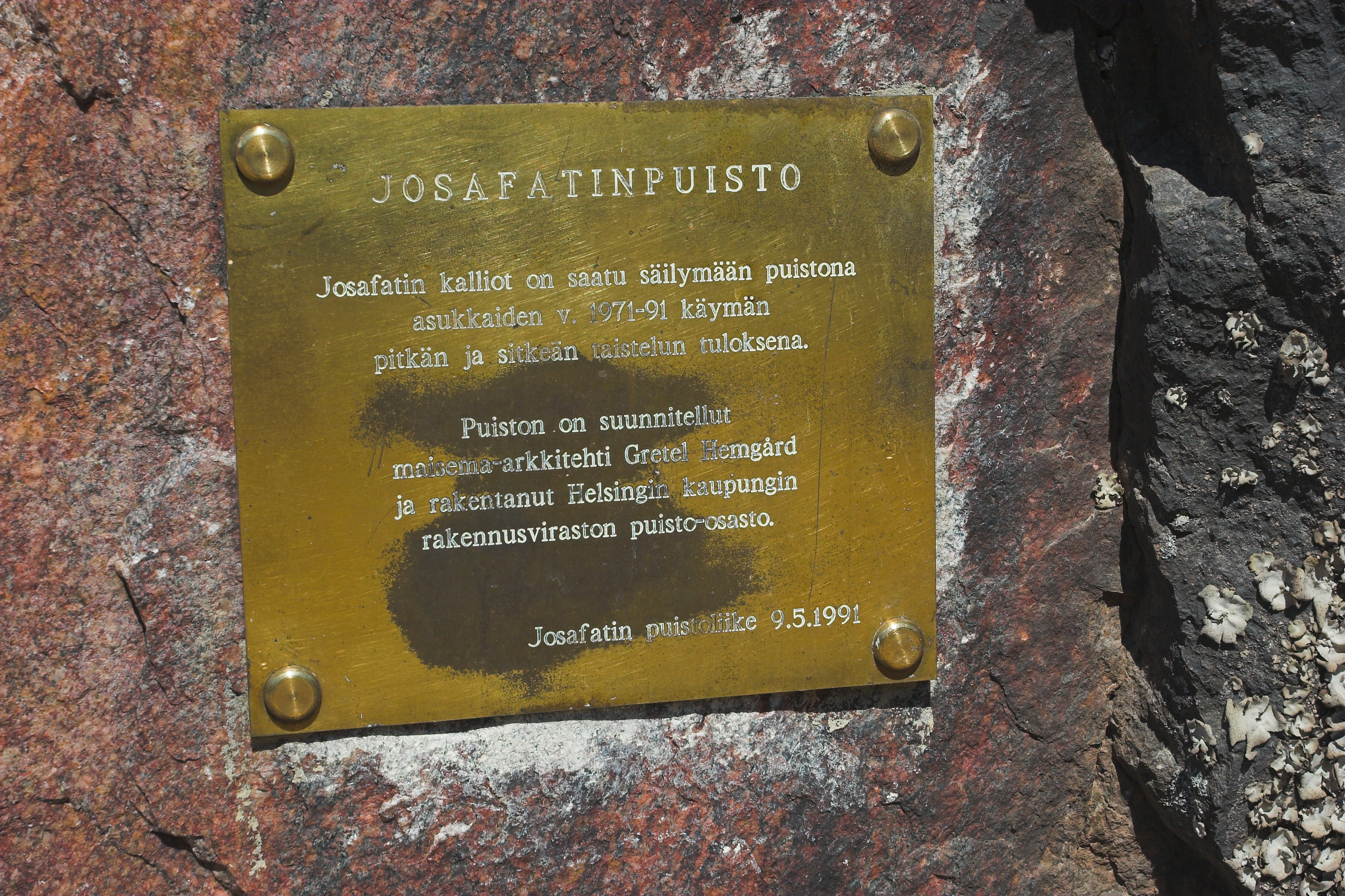 Josafatinpuiston laatta asukastoiminnasta.